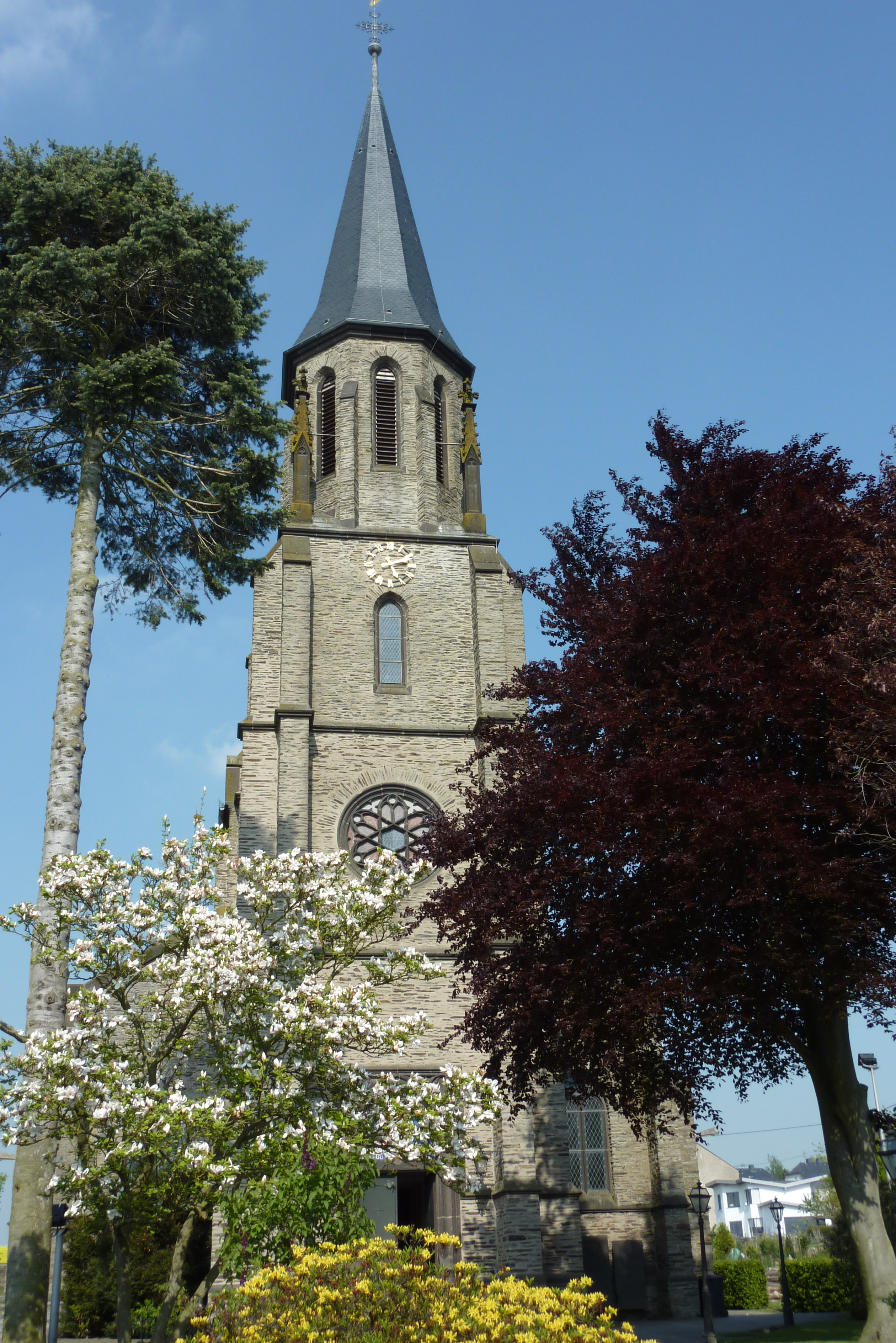 St. Kastor und St. Katharina in Kehrig, Eingangsfassade mit Turm